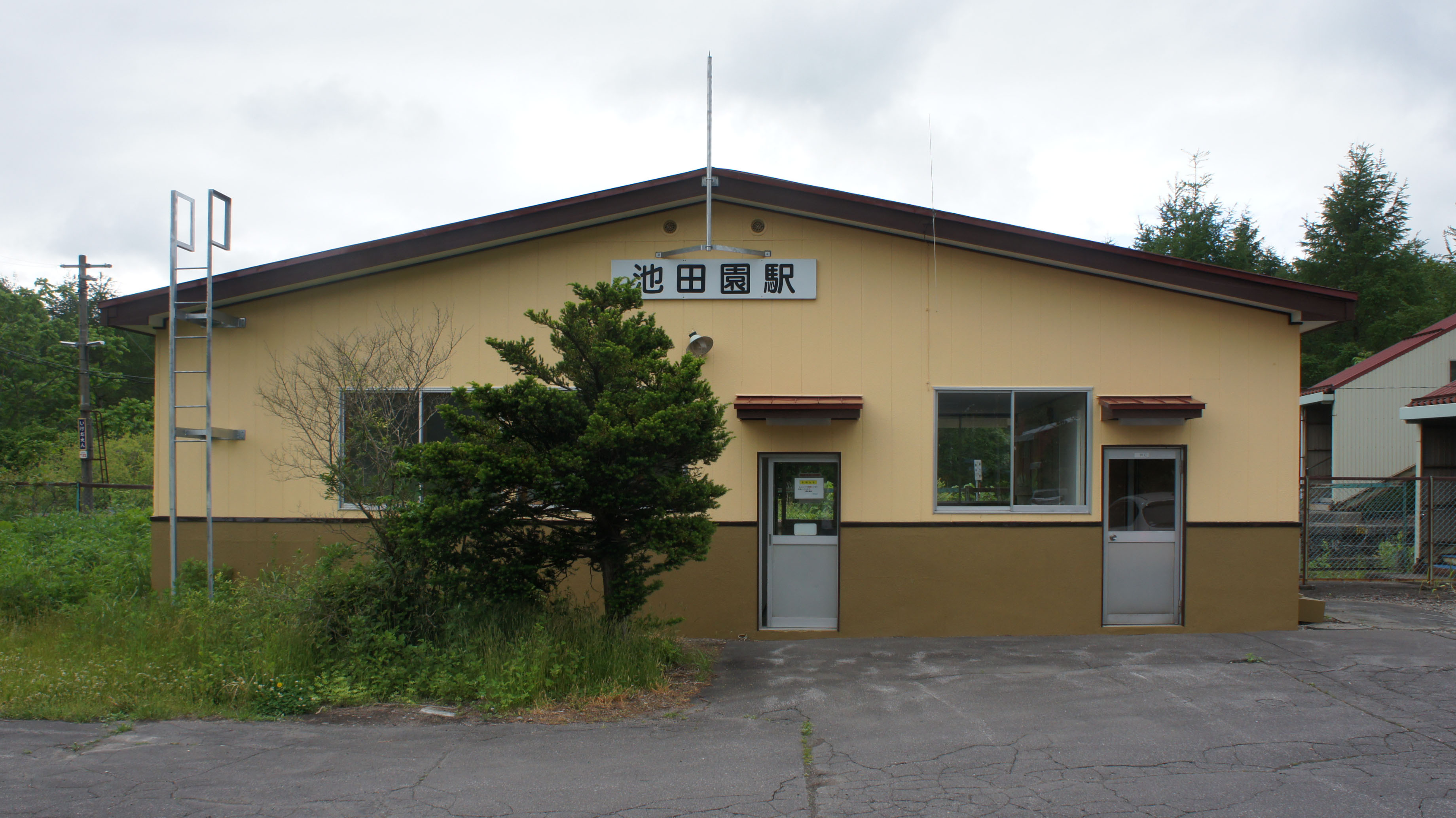 JR函館本線・池田園駅の駅舎